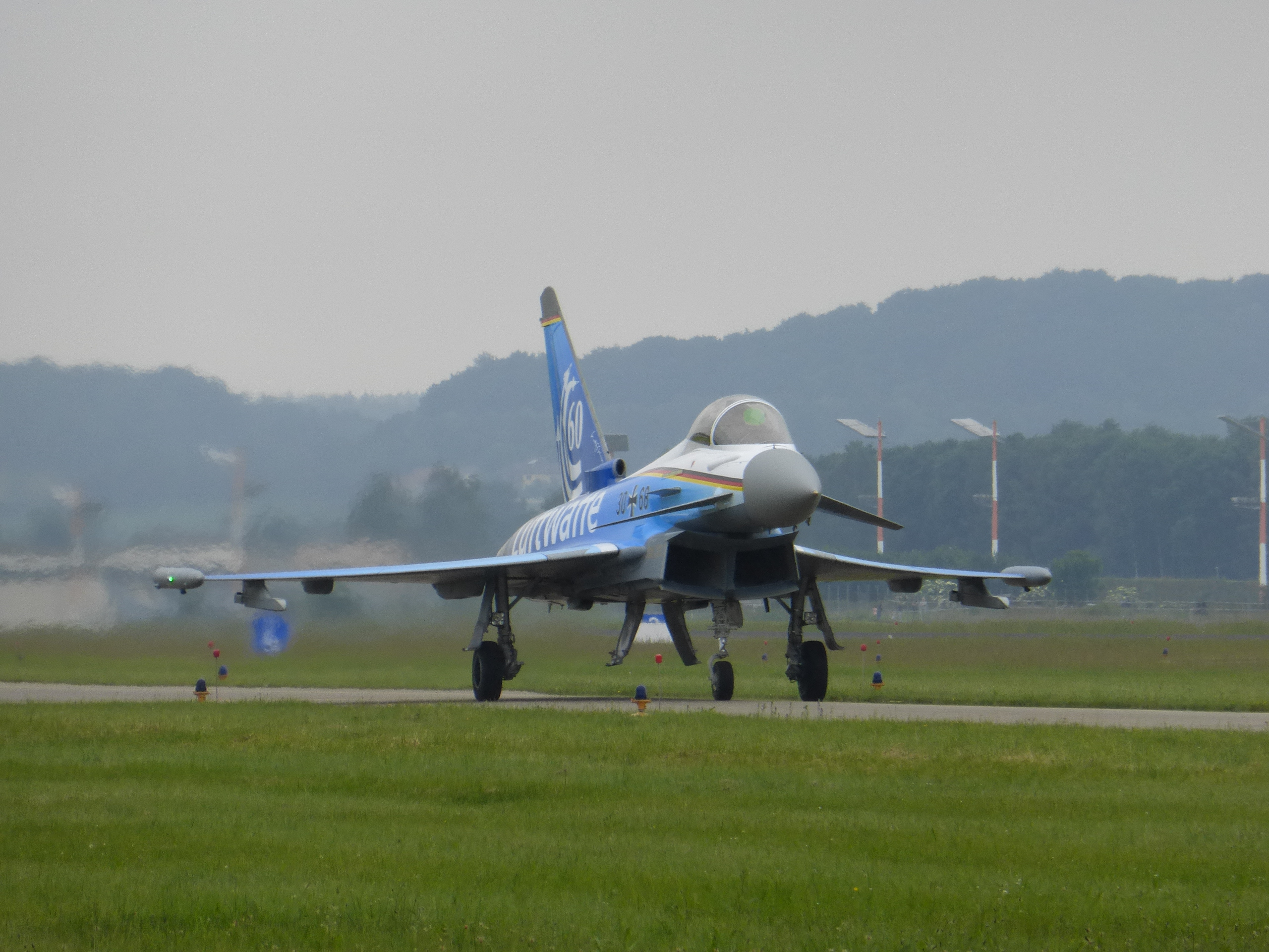 Eurofighter 30+68 mit Sonderlackierung "60 Jahre Luftwaffe" am Tag der Bundeswehr 2016 in Neuburg an der Donau